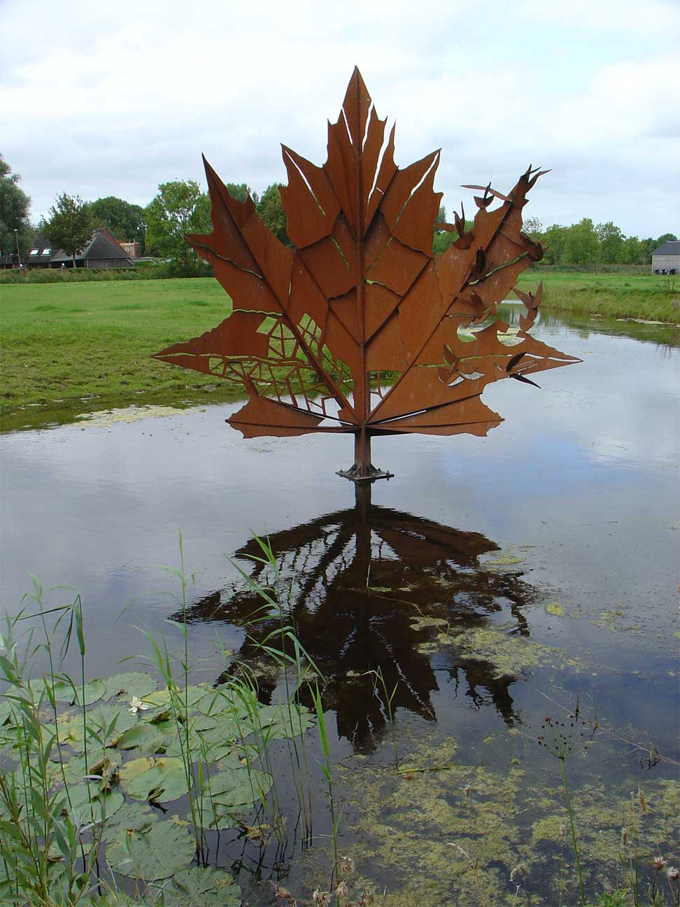 Esdoornblad (als eerbetoon aan de gesneuvelde Canadese militairen) beeld van Robin de Krijger in Noorddijk te Groningen